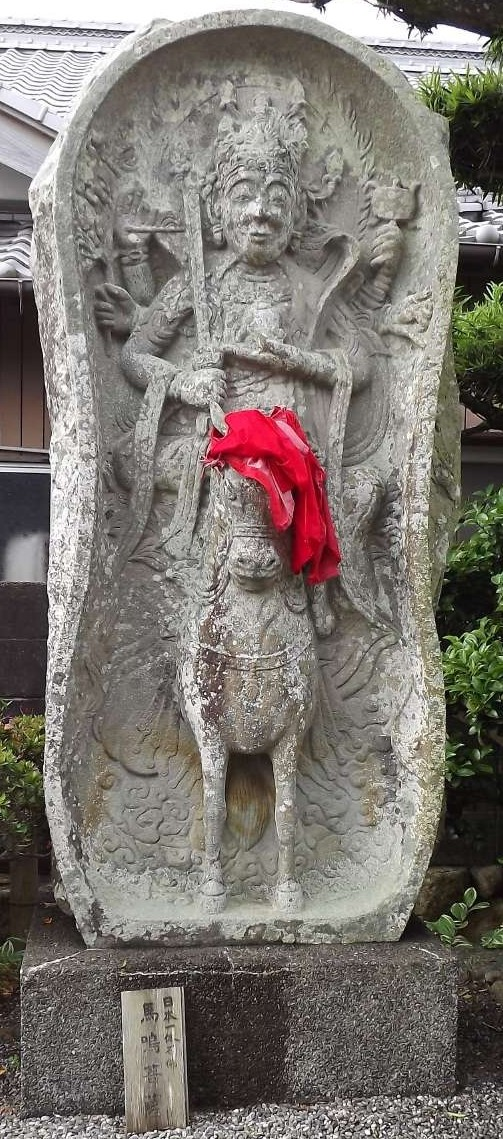 繁昌院の馬鳴菩薩石像